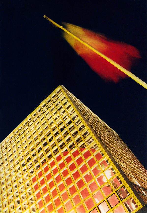 Sala Construcción milenaria y bandera de México